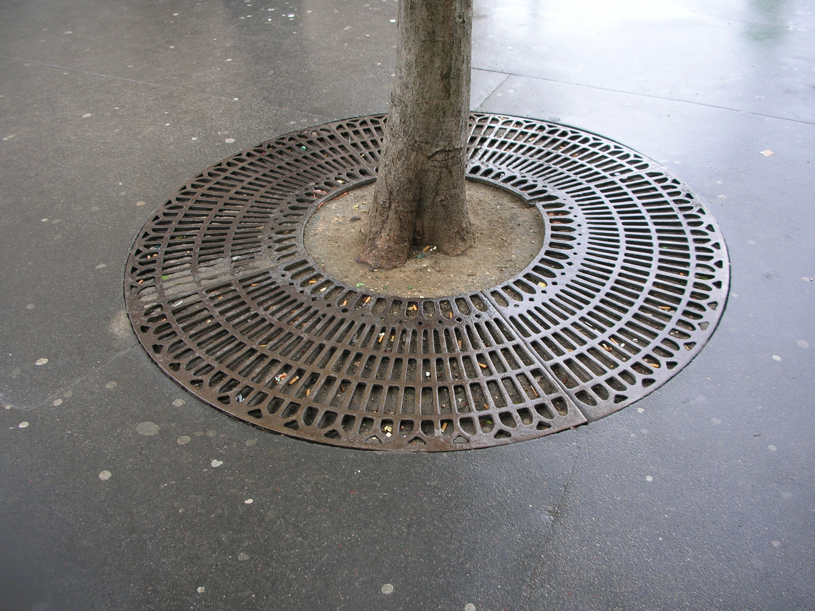 Gitterrost für Baumschutz. Paris.